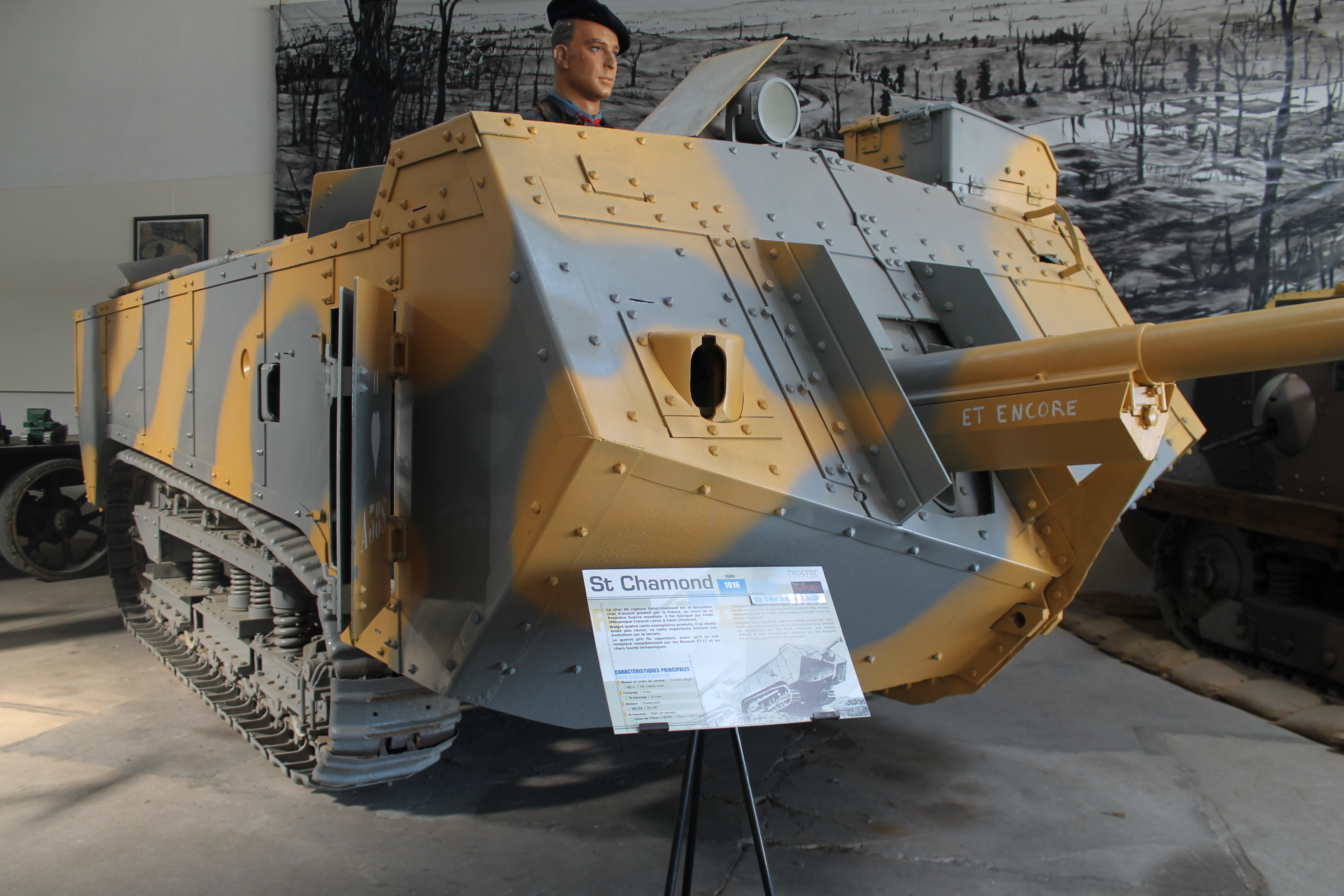 Char Saint Chamond